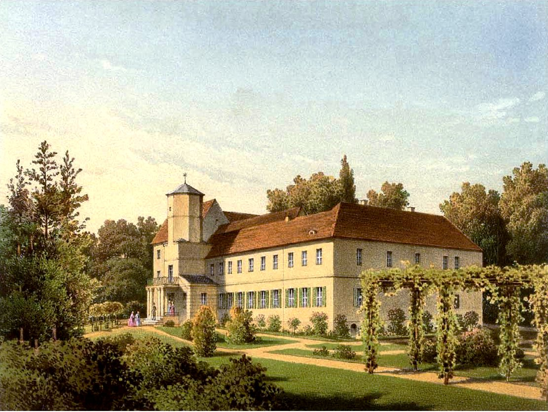 Rittergut Görlsdorf